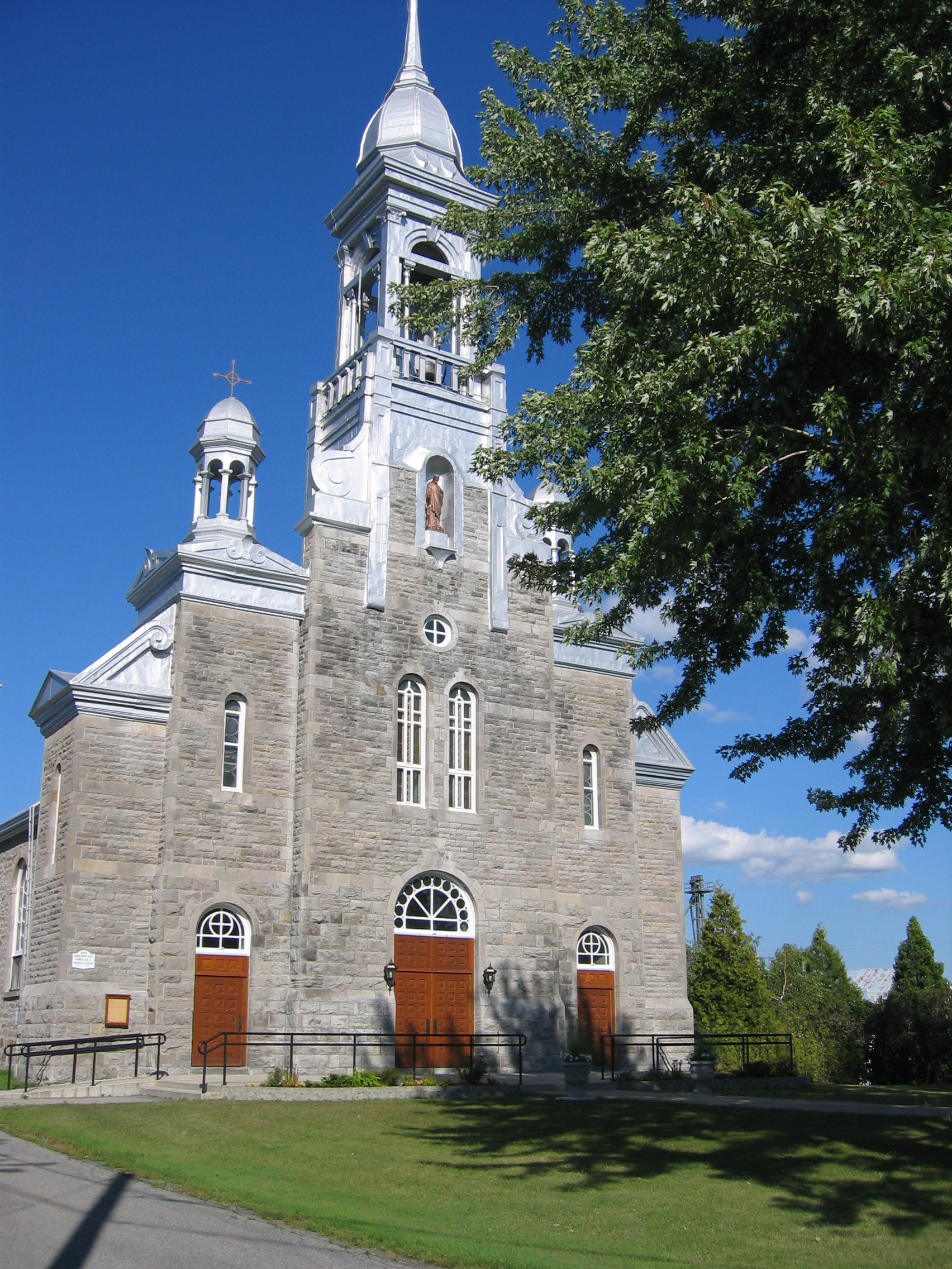 Église de Saint-Urbain-Premier, Source personnelle